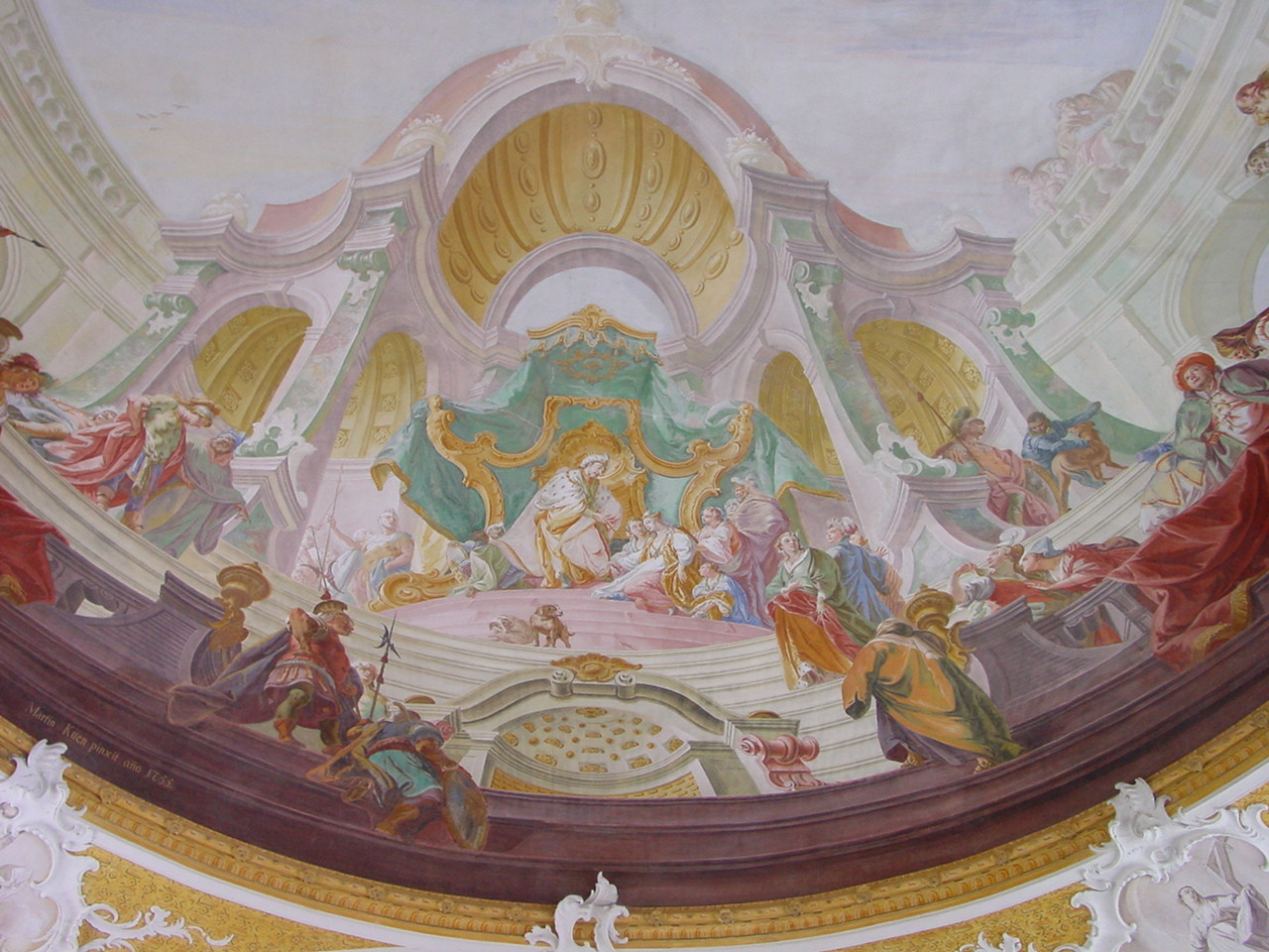 Wallfahrtskirche Maria Kappel, Schmiechen: Ausschnitt aus dem Deckenfresco von Franz Martin Kuen